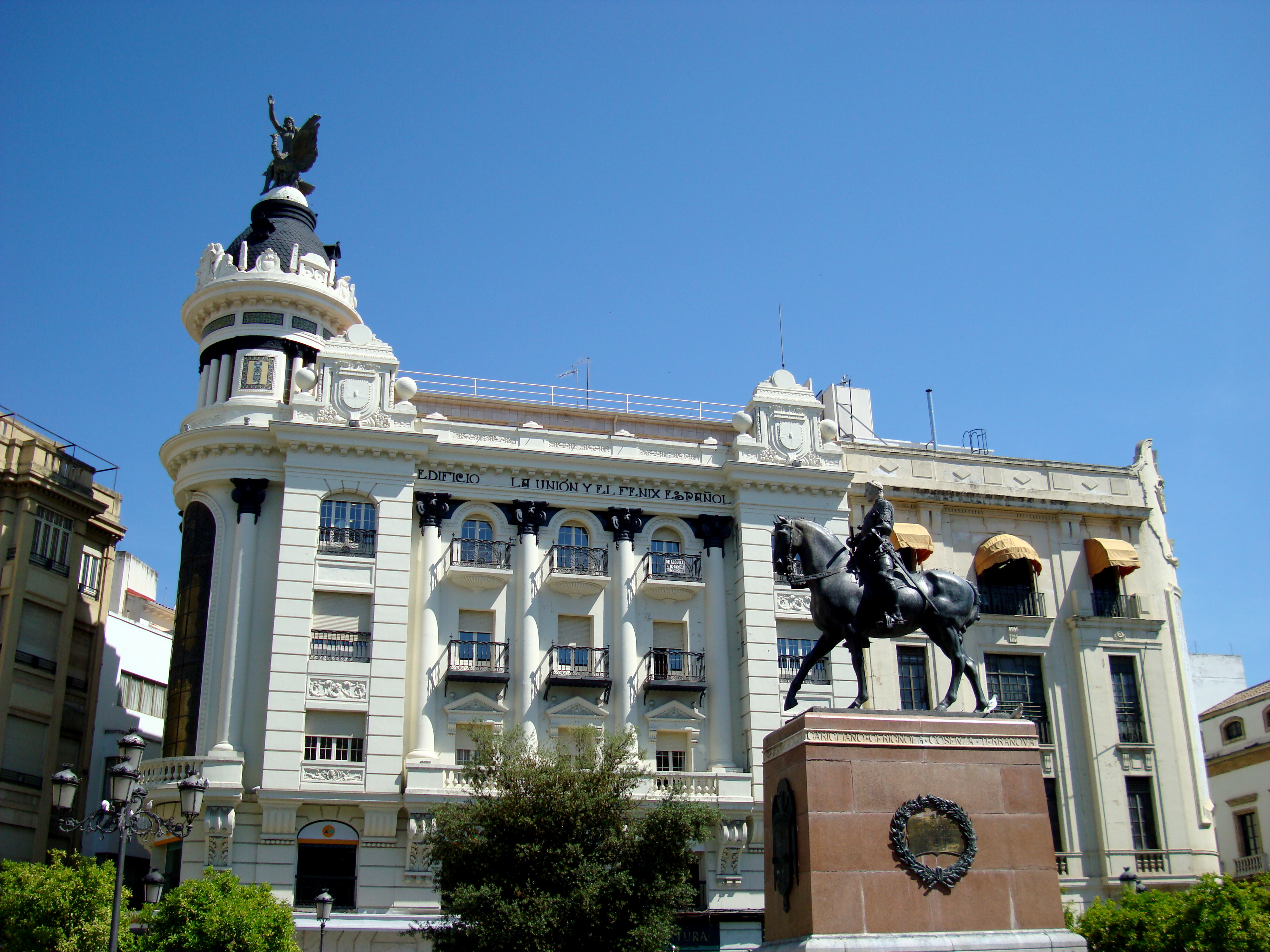 Plaza de las Tendillas: Escultura al Gran Capitán, Edificio y de La Unión y el Fénix Español y Edificio de Telefónica.